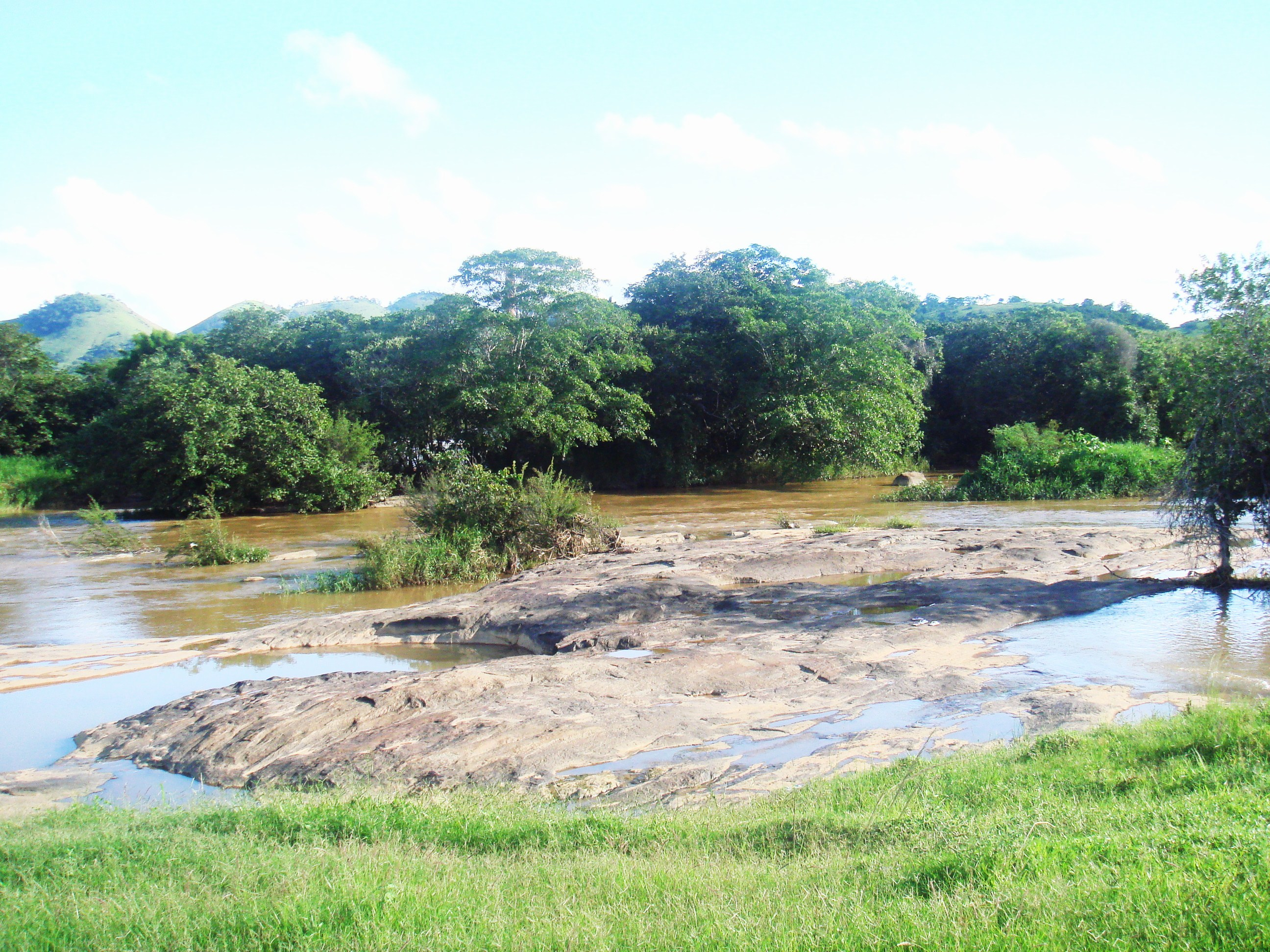 Lajeado, ponto turístico de Três Irmãos